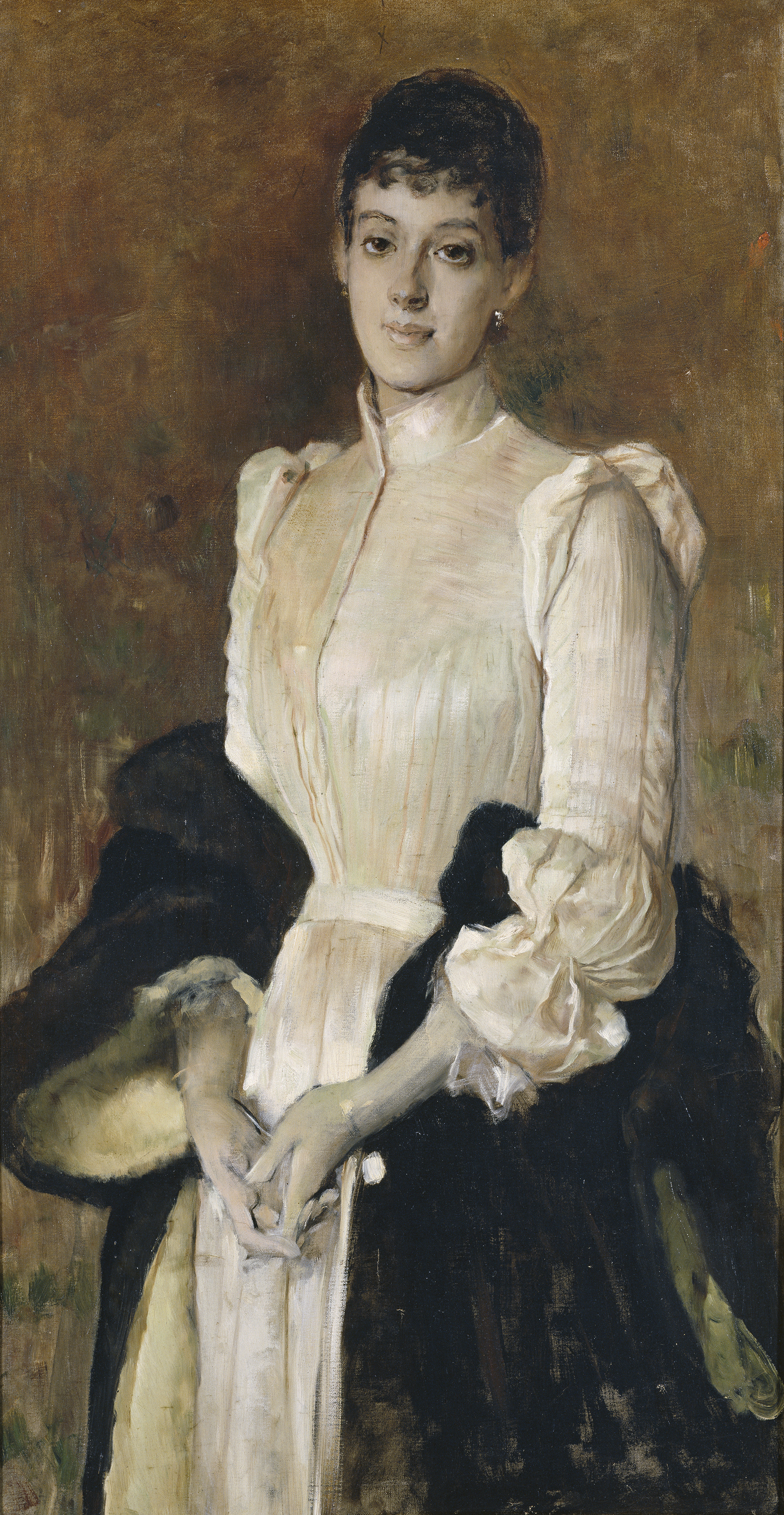 La dama está retratada en pie de tres cuartos, ligeramente girada hacia la izquierda, en una pose muy relajada con las manos entrelazadas. Hija del General Miramón, fusilado junto al emperador Maximiliano, la dama residía en Roma cuando fue retratada por el pintor. Destaca en la condesa la ausencia de joyas y vestidos lujosos reduciéndose al abrigo el único elemento de cierta ostentación. Éste es utilizado para dar a la imagen un sentido de instantaneidad al estar casualmente reposando sobre los brazos de la retratada, como si apenas se lo hubiera quitado de los hombros.